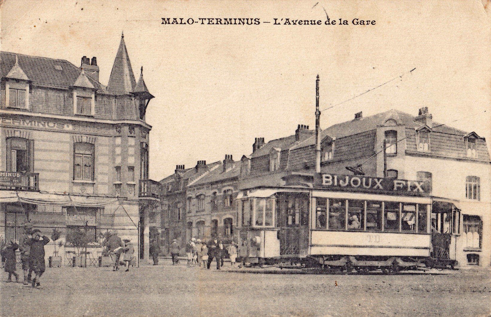 Carte postale ancienne sans mention d'éditeur :MALO-TERMINUS - L'Avenue de la Gare